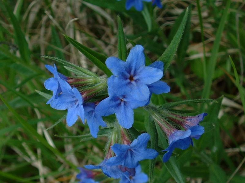 Grémil rouge-bleu, Auberive, mai 2004